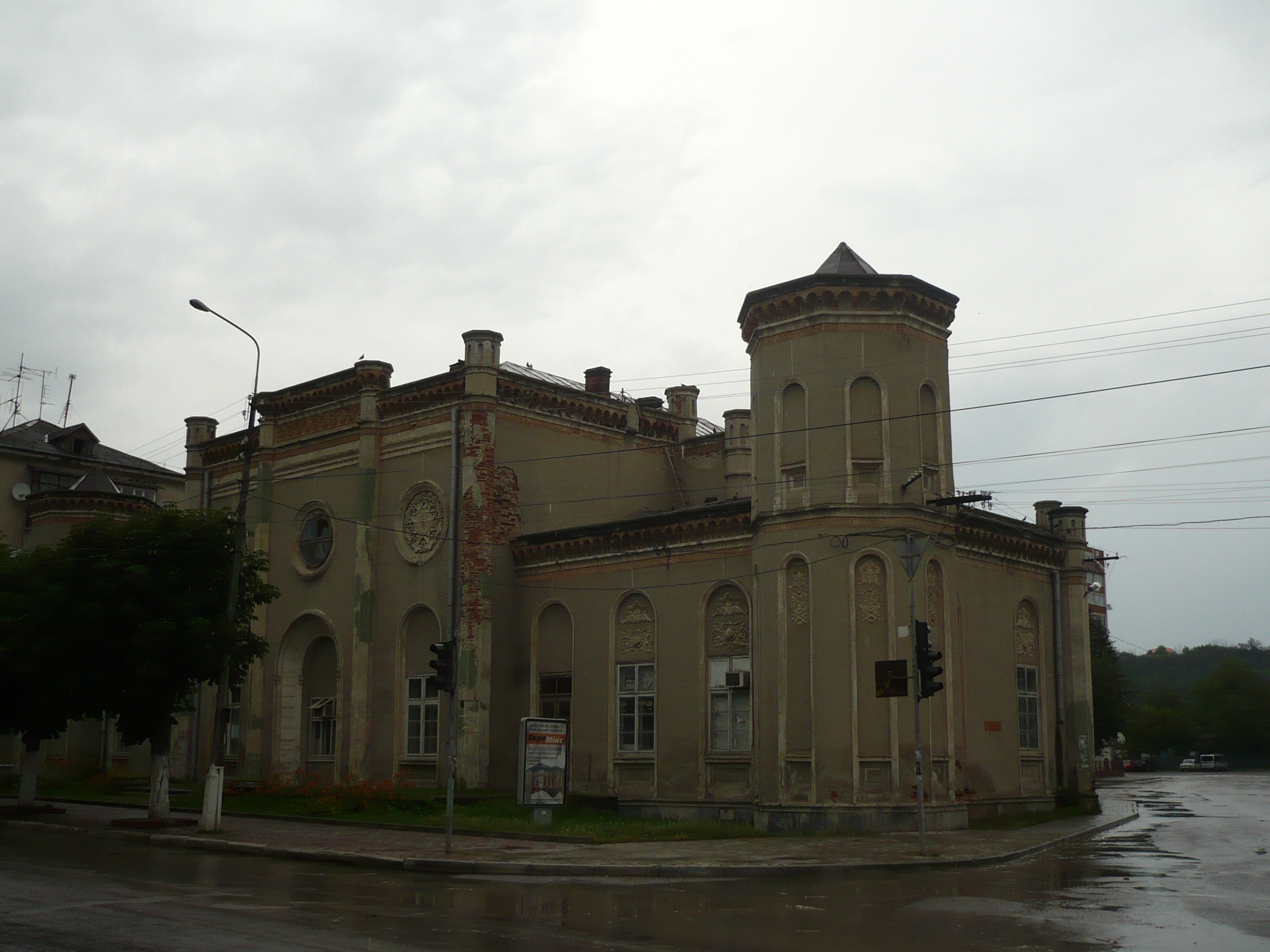 Czortków. Synagoga